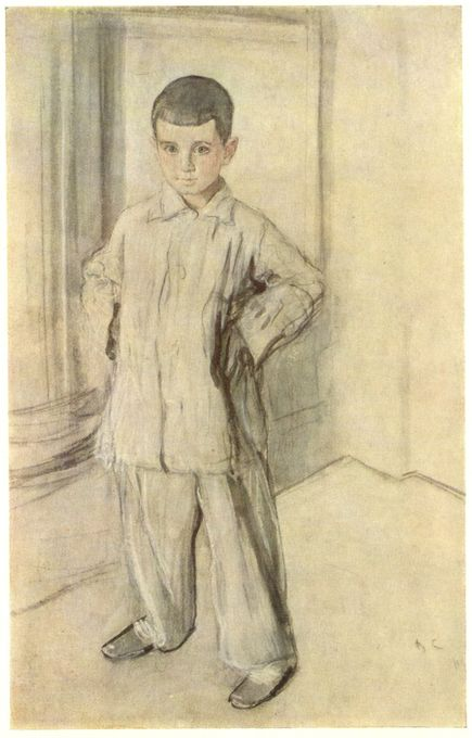 Портрет Л.К. Нарышкина. 1910 г. Бумага на картоне, уголь, пастель, сангина. 90х70. Частное собрание. Ленинград